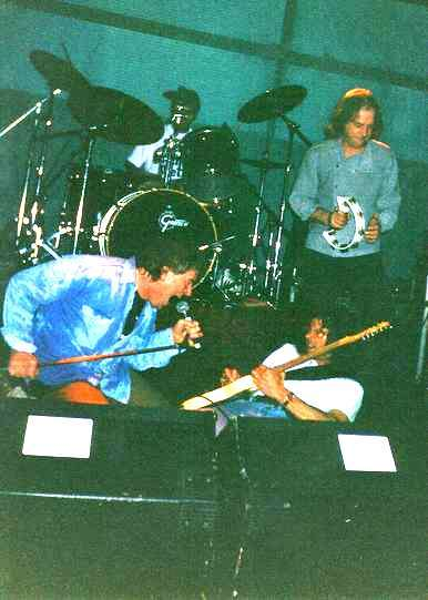 The Pretty Things live 1999